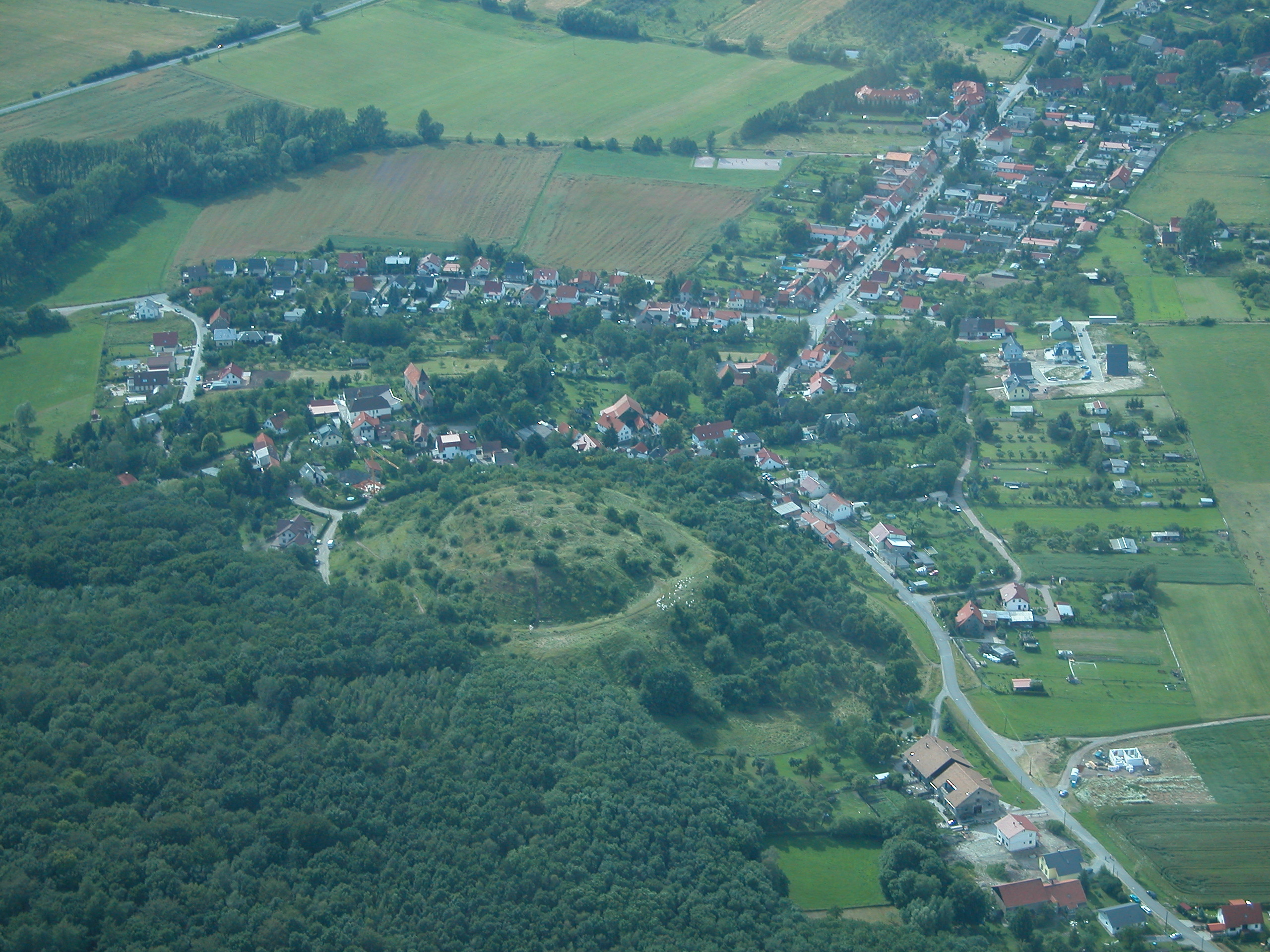 Luftbild der Käfernburg bei Arnstadt (IK)